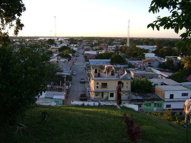 Jonuta, Tabasco. México. Foto tomada desde arriba del "cuyo" (montículo de tierra). Se sube por unas escalera hasta el parque que se encuentra en la parte superior del mismo. Es un mirador espléndido desde donde se observa el pueblo de Jonuta y sus alrrededores, su exuberante vegetación con un verde impresionante y la majestuosidad del Rio Usumacinta y uno de sus afluentes, el rio San Antonio.